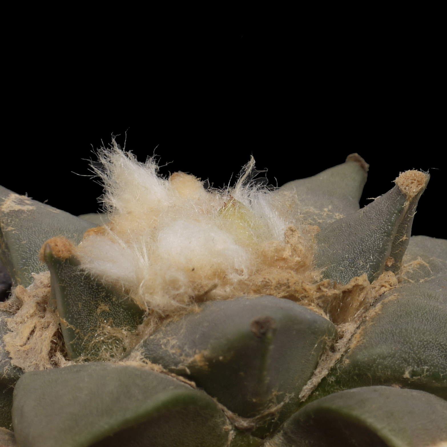 Ariocarpus retusus (Syn. A. furfuraceus) in Knospe.